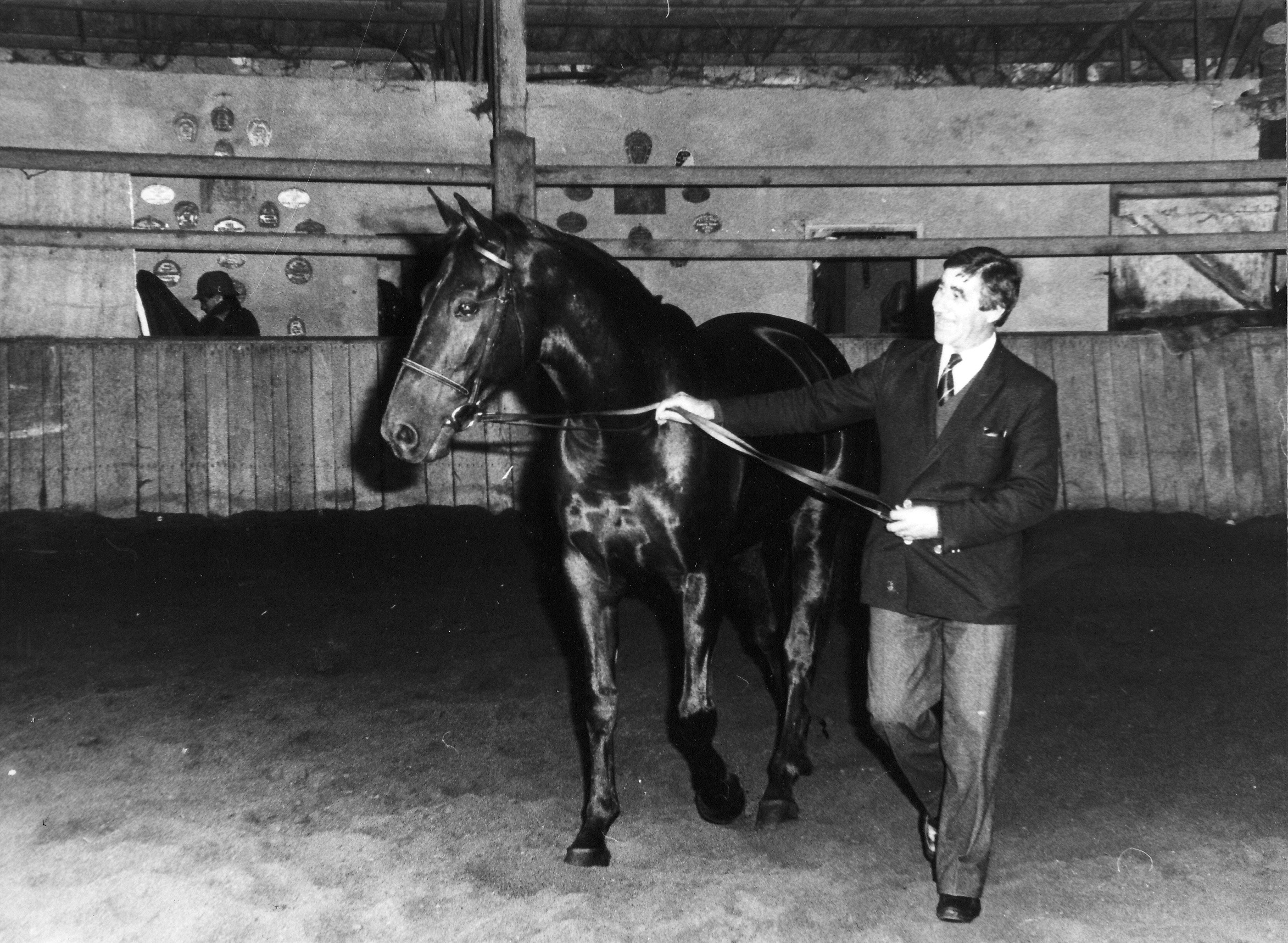 Jappeloup avec son propriétaire